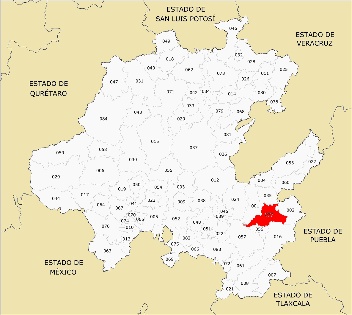 Municipios de Hidalgo